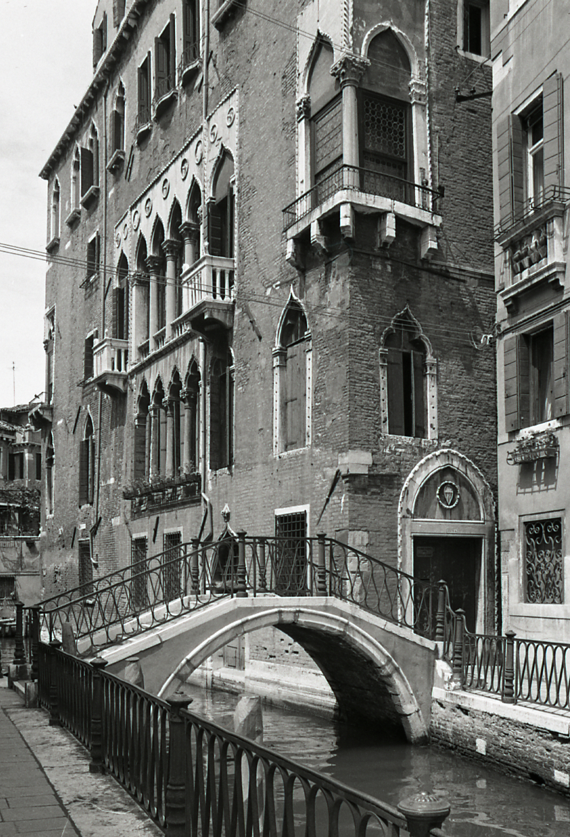 Servizio fotografico : Venezia, 1968 / Paolo Monti. - Strisce: 6, Fotogrammi complessivi: 34 : Negativo b/n, gelatina bromuro d'argento/ pellicola ; 35 mm. - ((I fotogrammi hanno una doppia numerazione. . - Sul portanegativi: Nikon Adox 21. - Sul dorso del portanegativi Monti specifica: "Portale con bambini". - Probabilmente questa specifica in penna biro rossa si riferisce a ricerche personali che esulano dal contesto del servizio commissionato da Electa. - Occasione: Pubblicazione: "Edoardo ARSLAN, Venezia gotica: architettura civile gotica veneziana, Milano, Electa, 1970". - Fonte: Agenda di Paolo Monti: Venezia Architettura Gotica Civile / Ed. Electa maggio/giugno 1968 (1968/05-1968/06), presso Archivio Paolo Monti